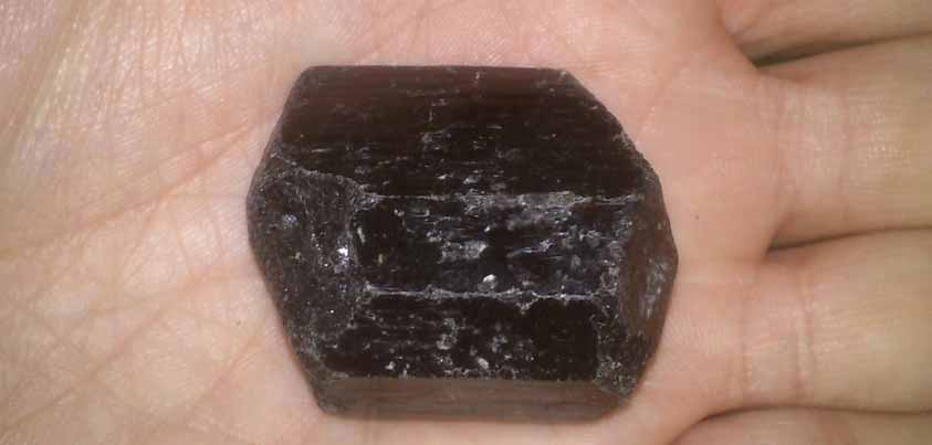 Turmalina negra